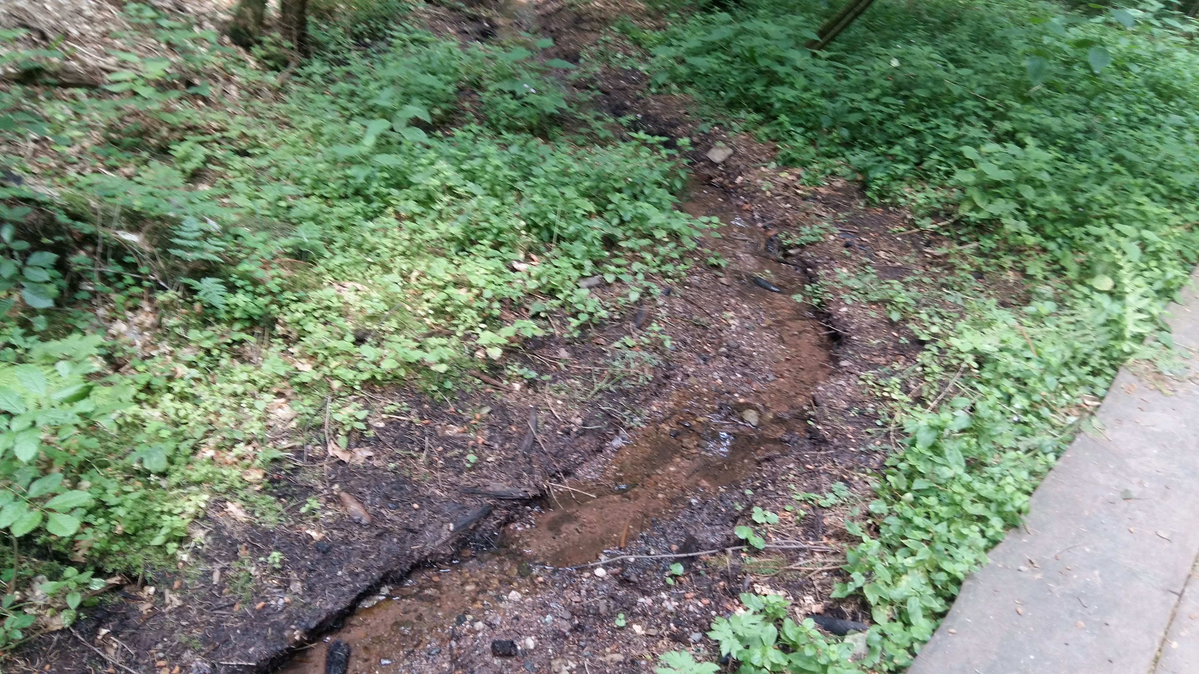 Lecznicze źródełko przy kapliczce Matki Boskiej Bolesnej.